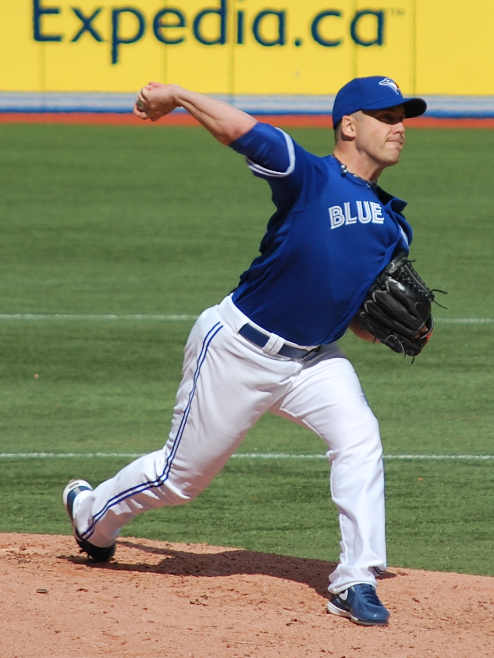 Shawn Hill